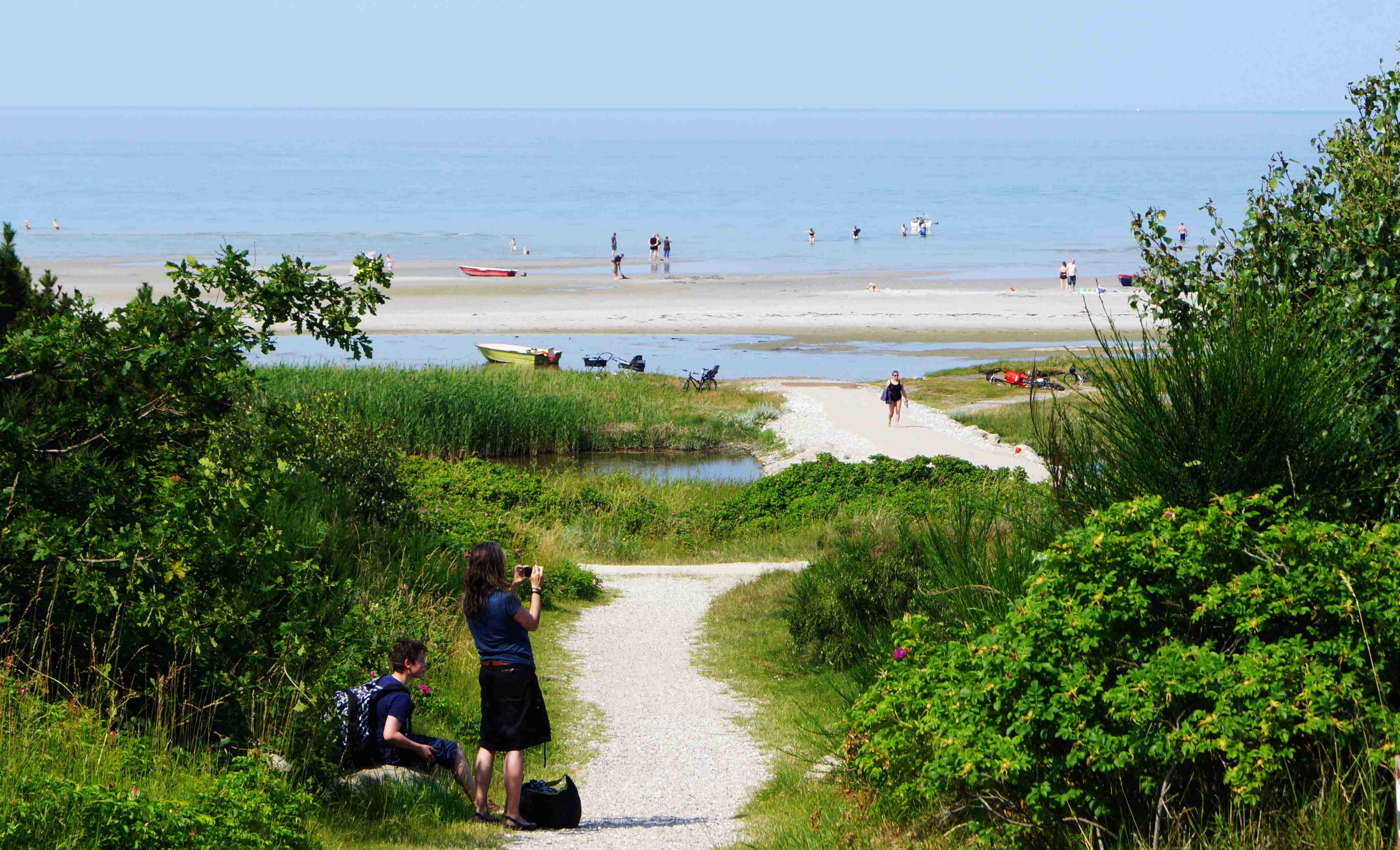 Bønnerup Strand oversigt